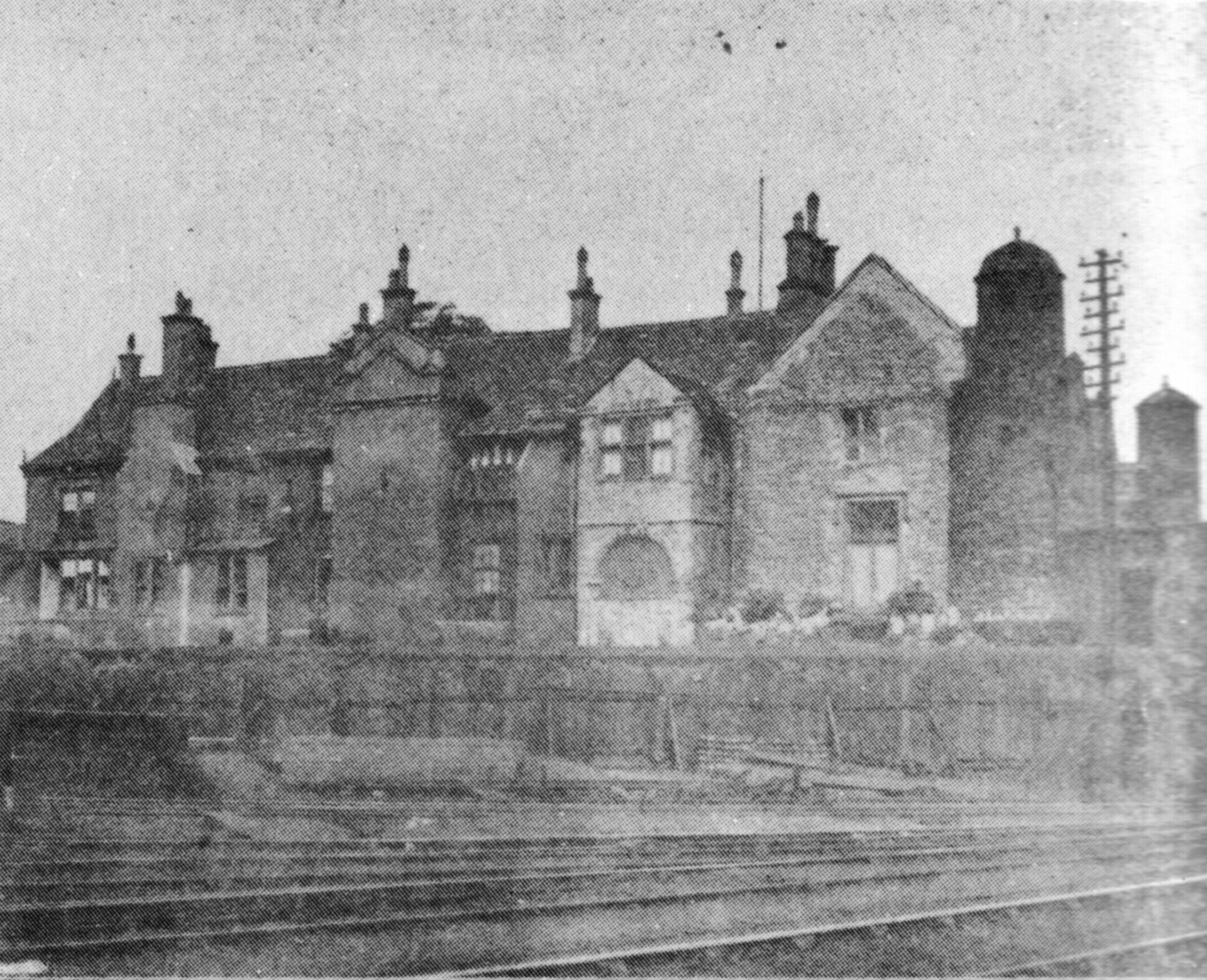 Ashton-under-Lyne old hall